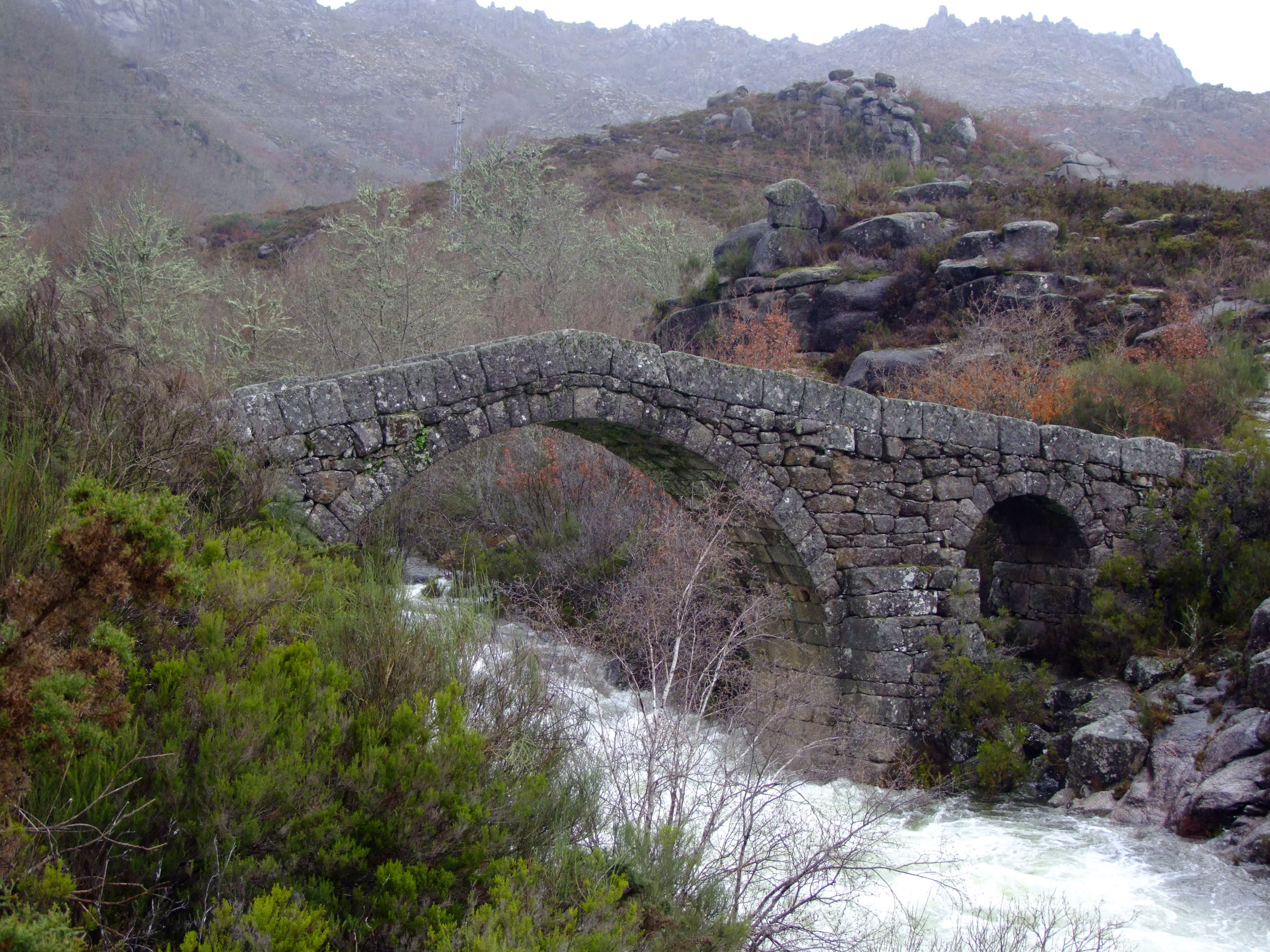 Vista nascente da Ponte Nova da Cava da Velha, sobre o rio Laboreiro, em Castro Laboreiro, Melgaço, Portugal.